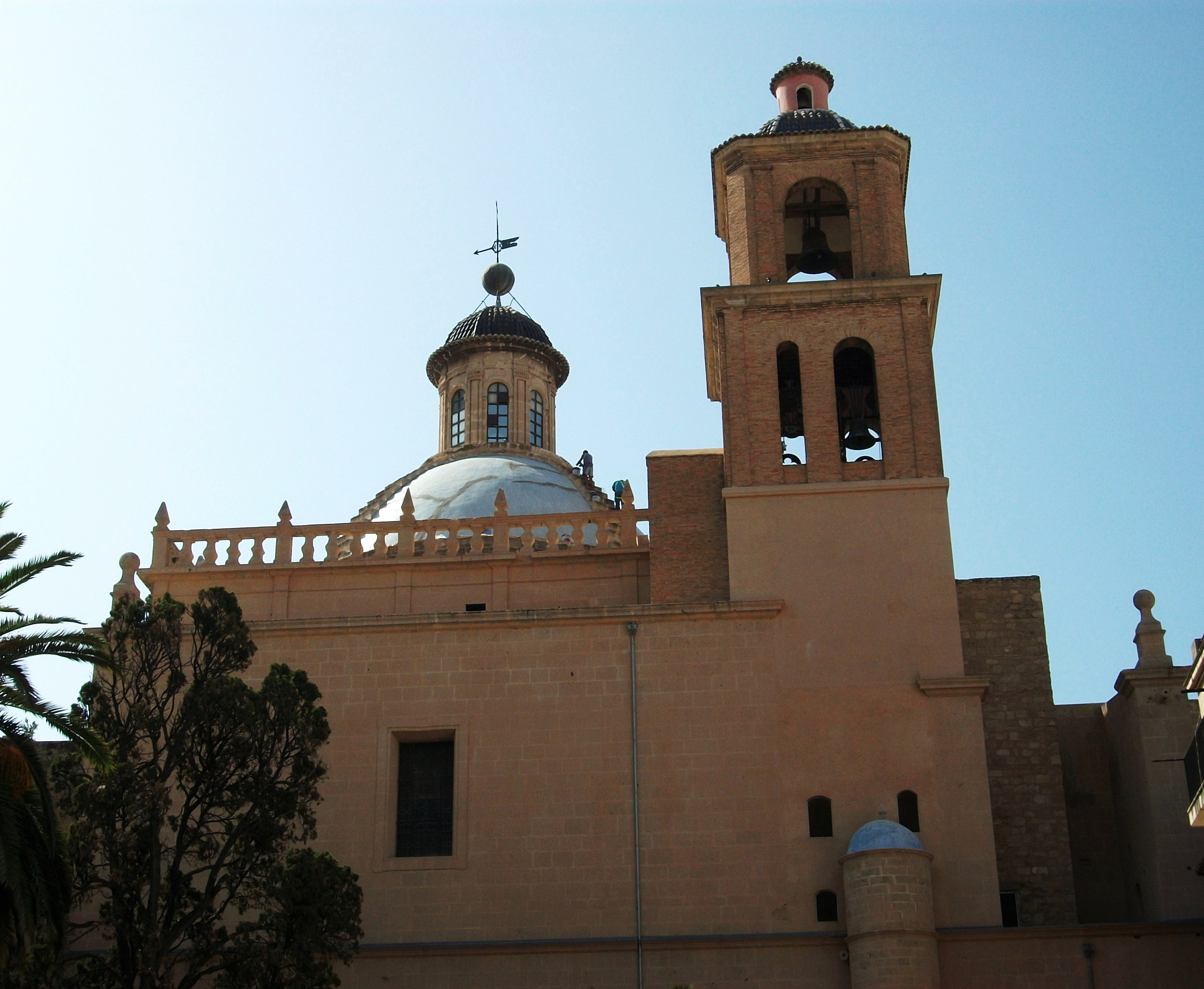 Exterior i campanar de la cocatedral de sant Nicolau d'Alacant.